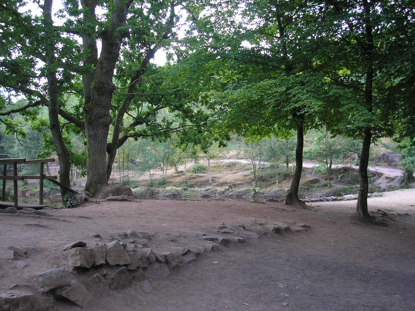 Digue du lac du Miroir aux fées, forêt de Brocéliande.